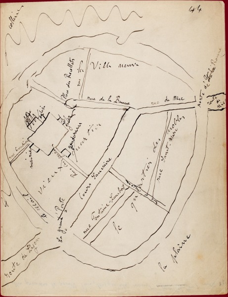 Plan préparatoire de Plassans réalisé par Émile Zola utilisé dans les romans : La Fortune des Rougon et La Curée